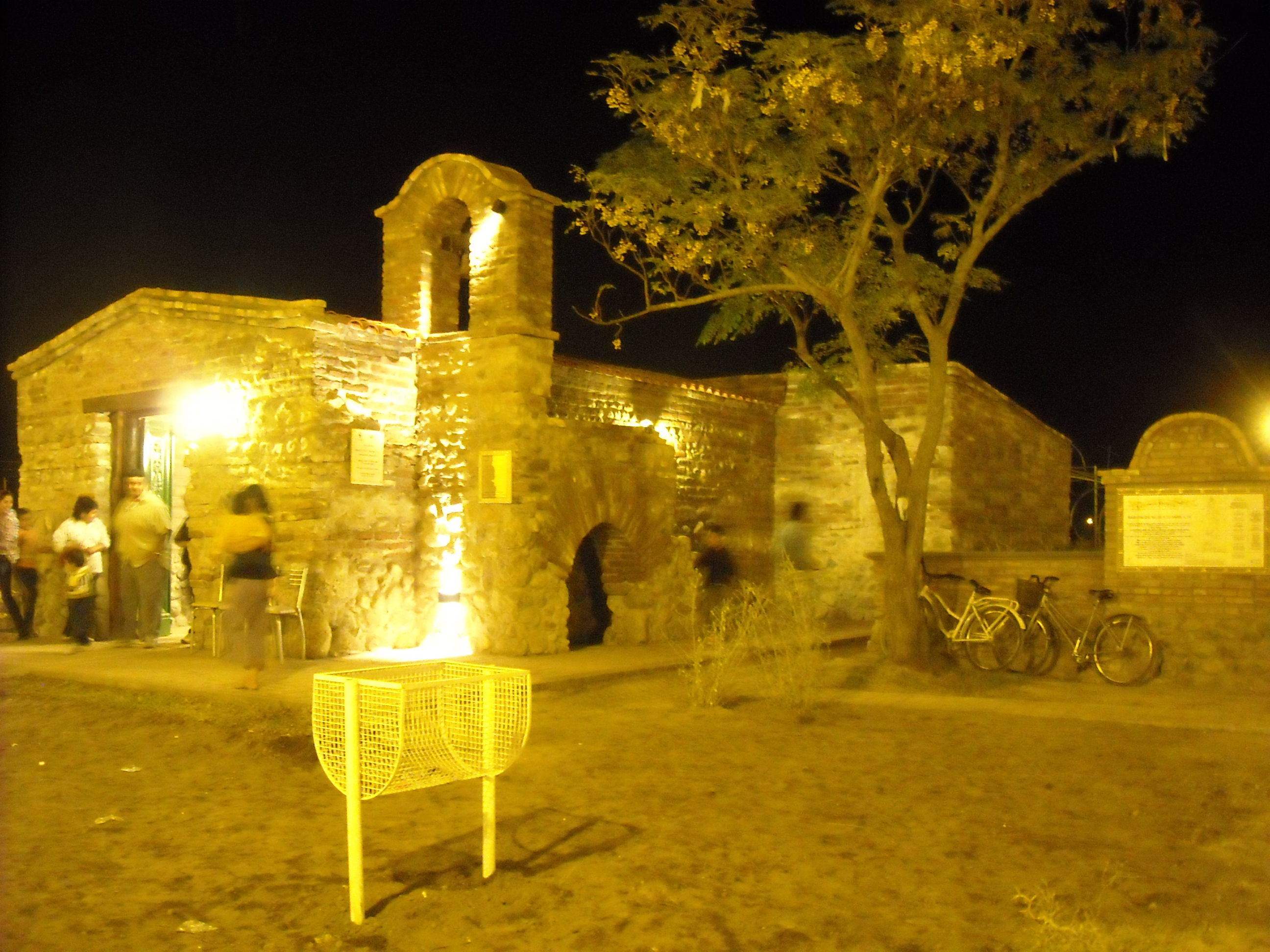 Vista nocturna de la Capilla Històrica de San José Obrero recosntruida tras su inauguraciòn en 2011